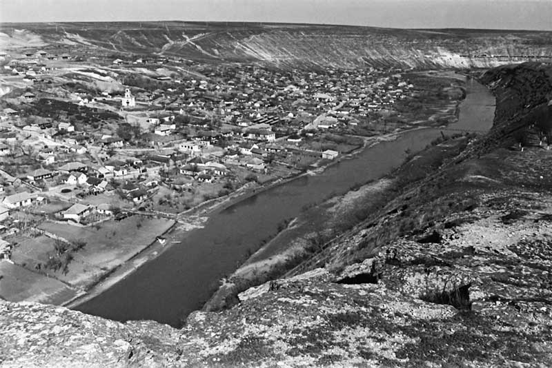 Orhei district.